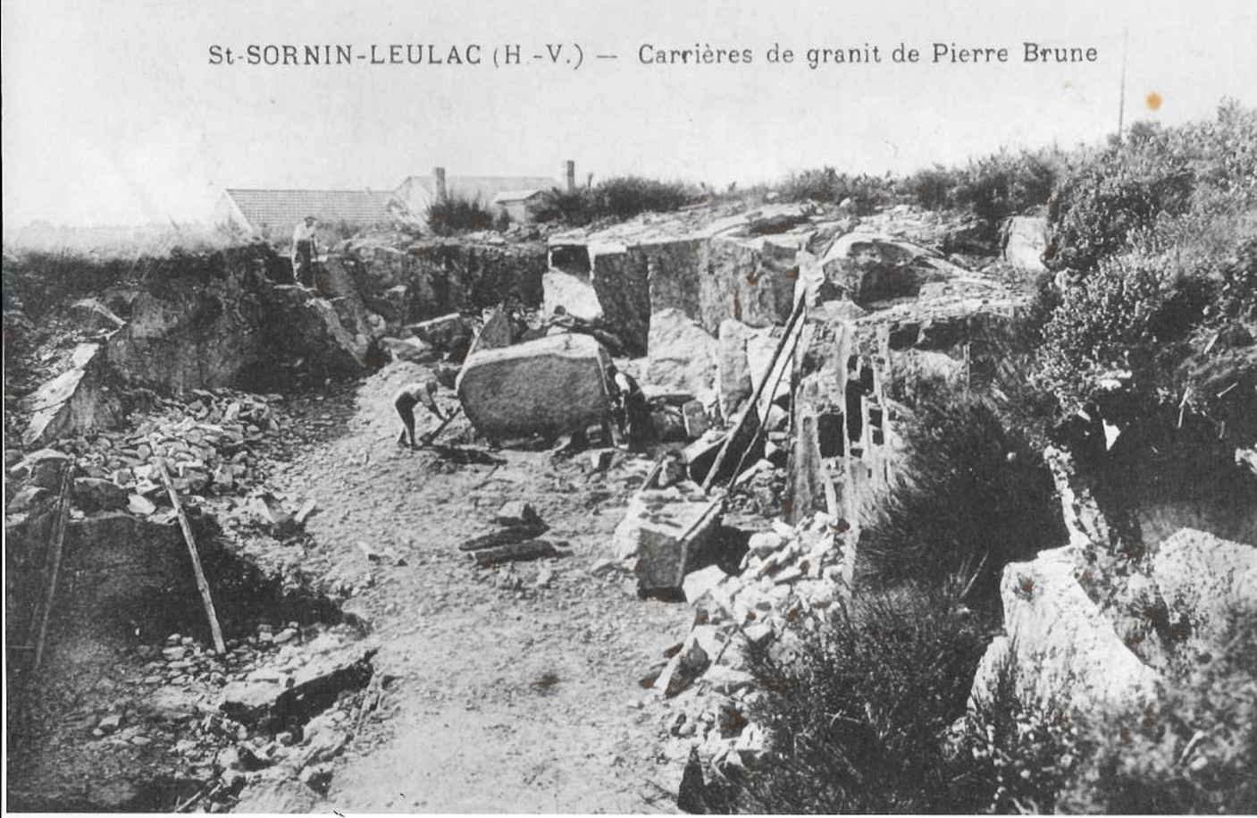 Carrières et exploitation du granite comme pierre de taille à Saint-Sornin-Leulac.